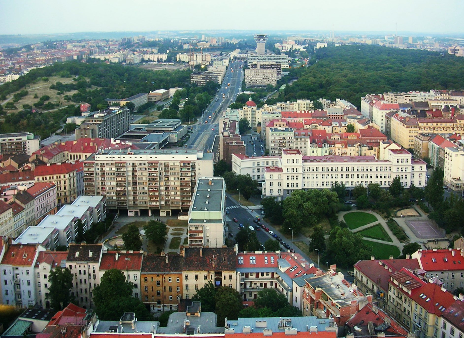 Praha-Žižkov, pohled ze žižkovské věže směrem k Olšanské ulici